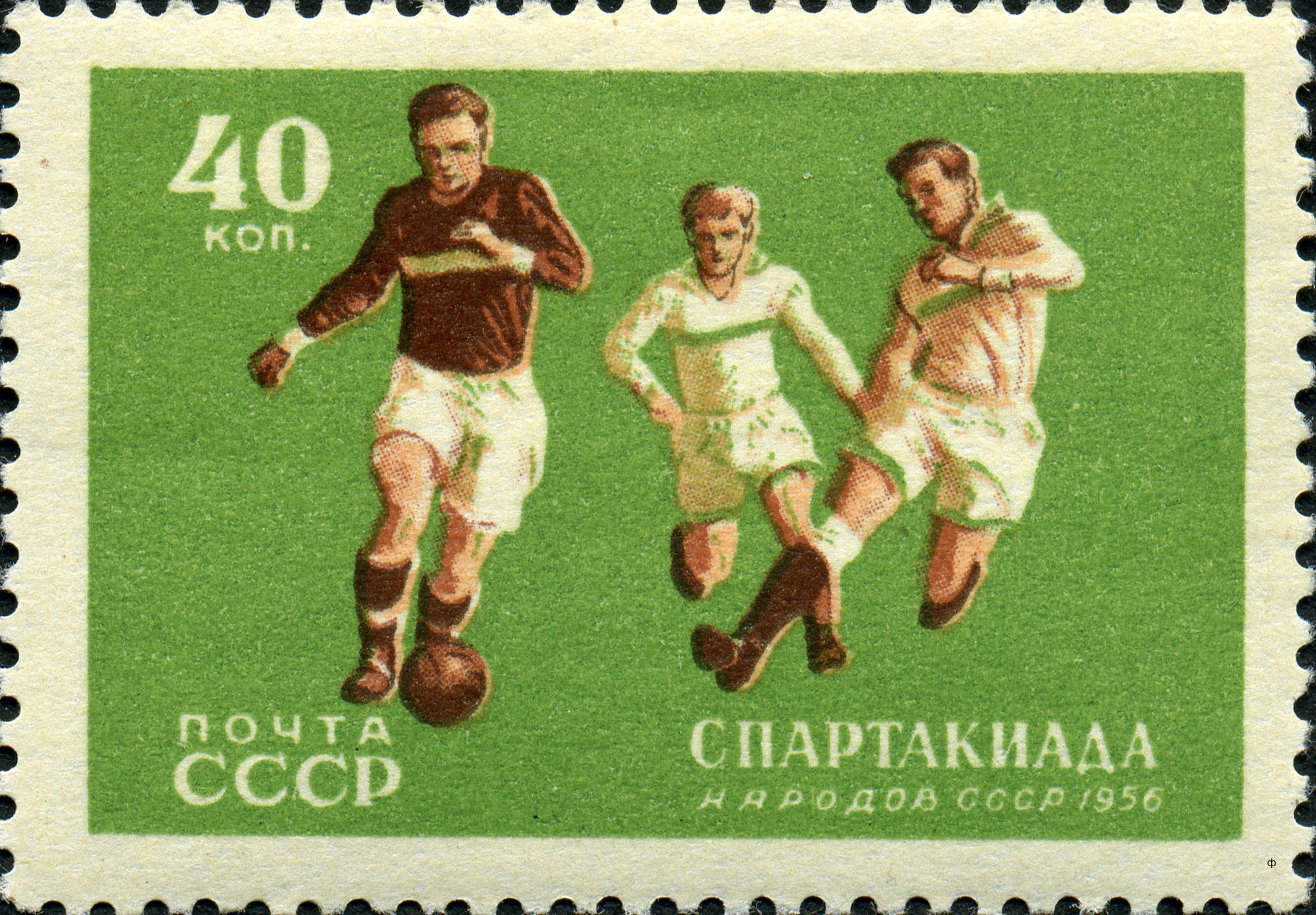 Марка СССР